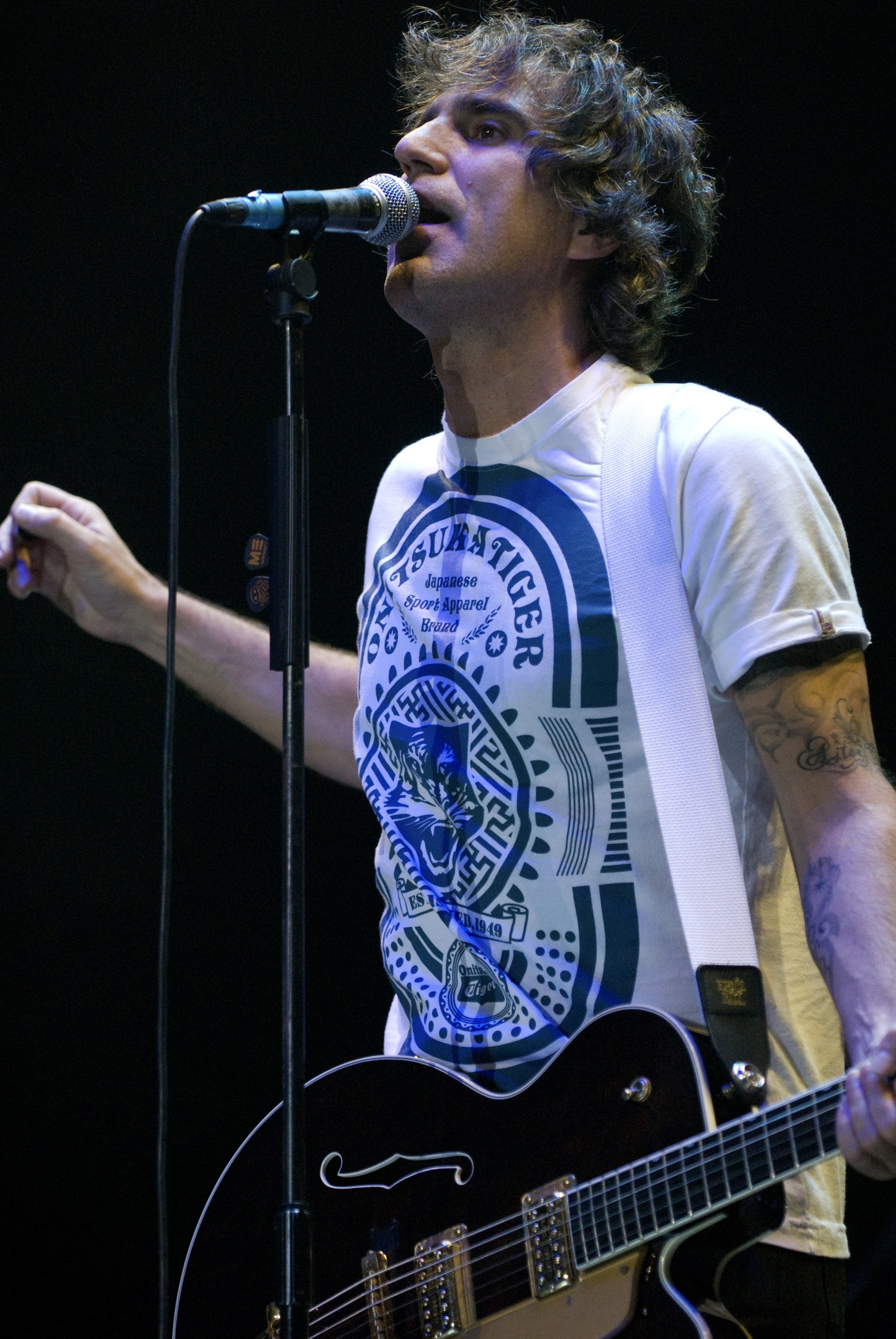 Mikel Erentxun